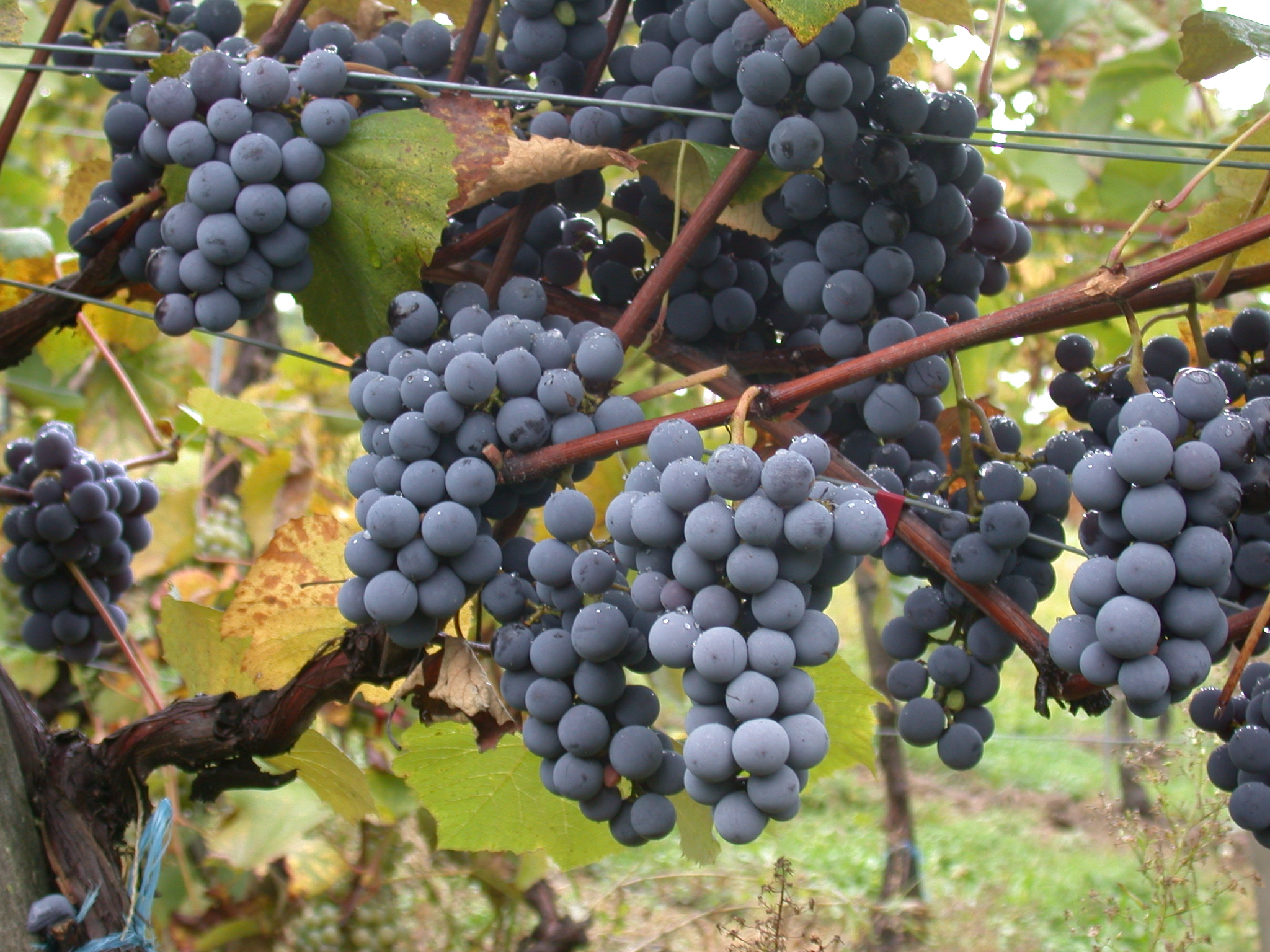 Interspezifische Kreuzung